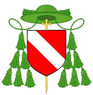 Erstes Wappen des Bischofs von Straßburg